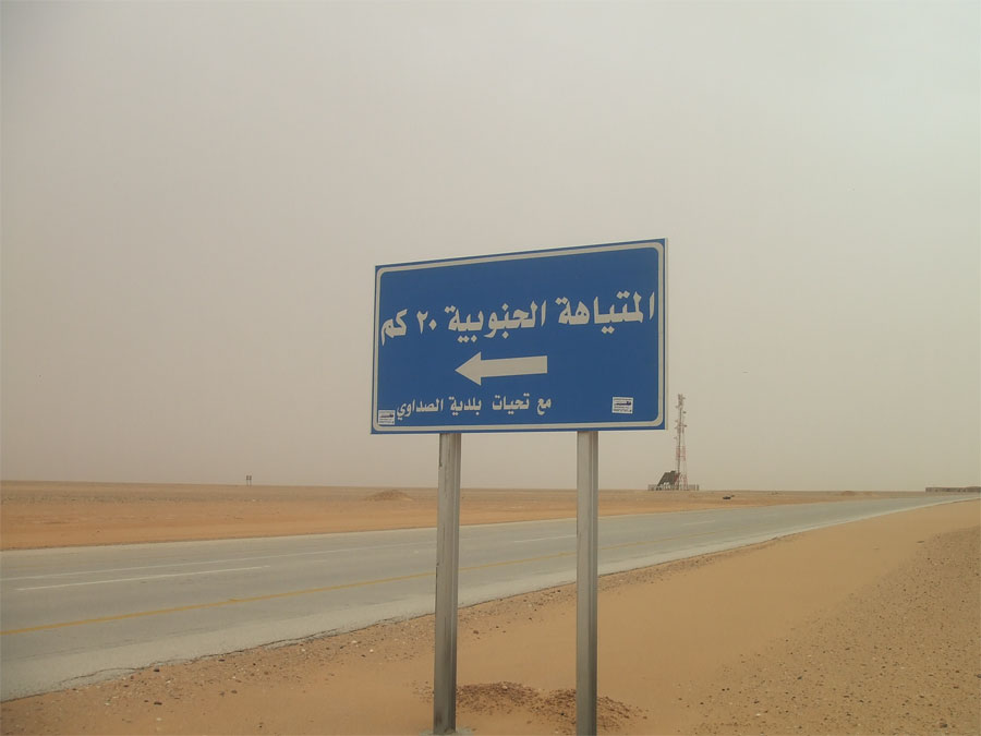 مفرق طريق الصداوي - المتياهة الجنوبية